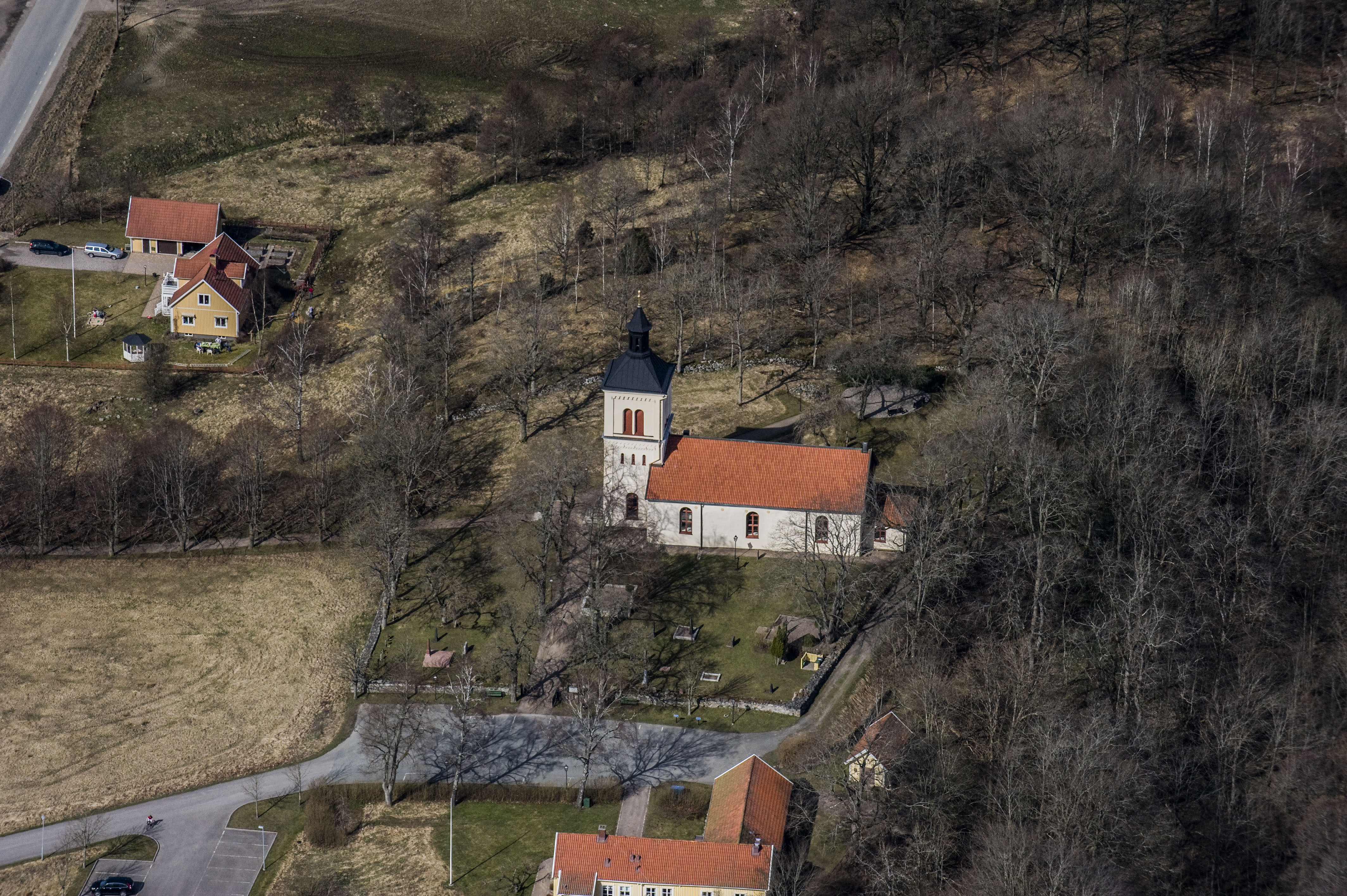 Järstorps kyrka